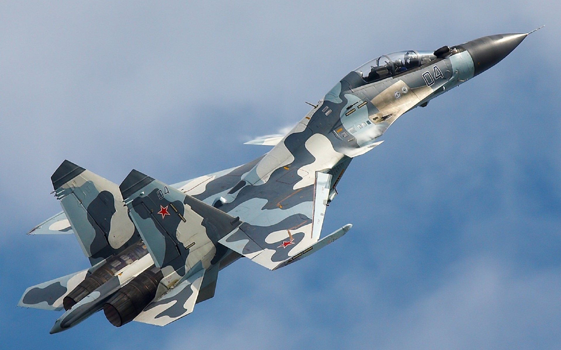 Sukhoi Su 30 de la Fuerza Aérea Rusa.